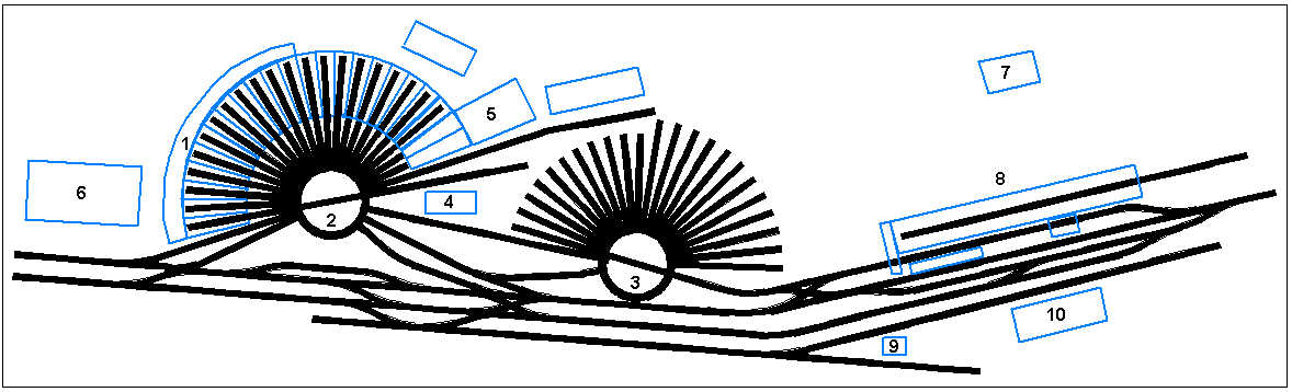 Grafik des BW Dillenburg um 1935